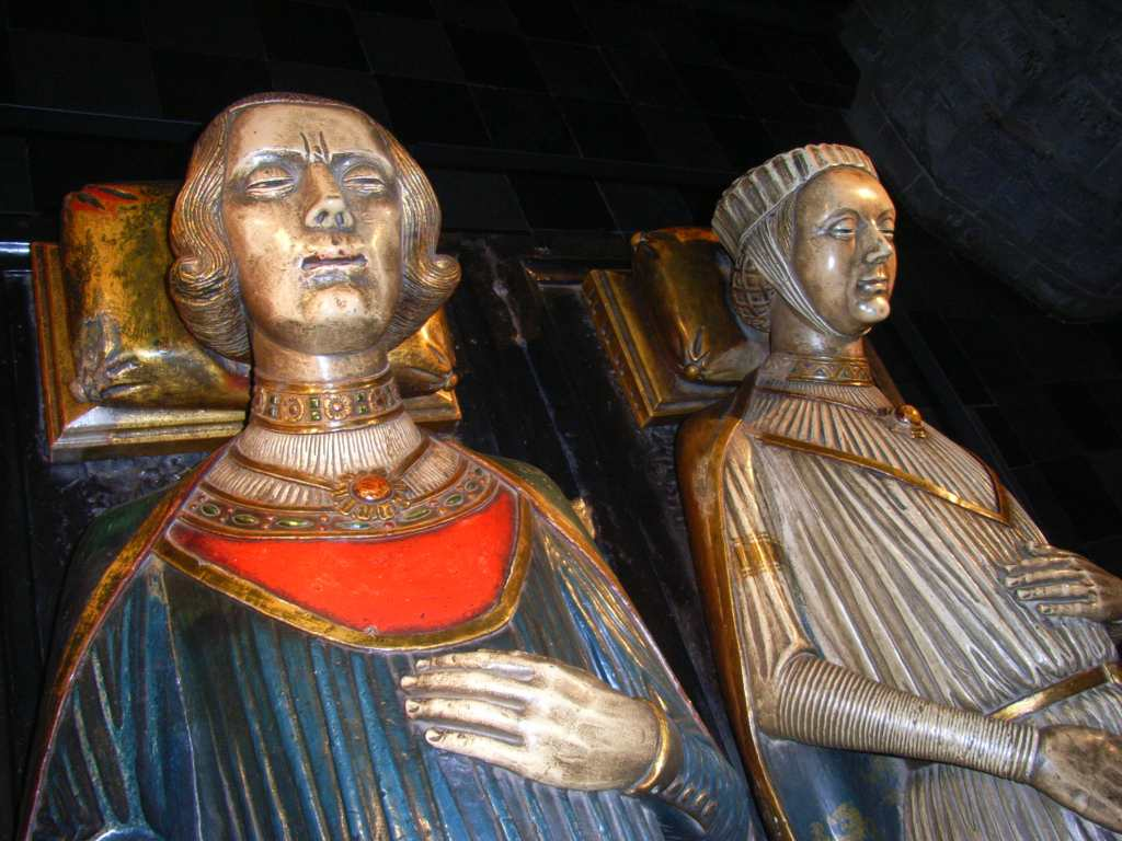 liegende Grabplastiken Gerhard III von Geldern u. Margaretha von Brabant, ca.1230 Münsterkirche, Roermond, NL